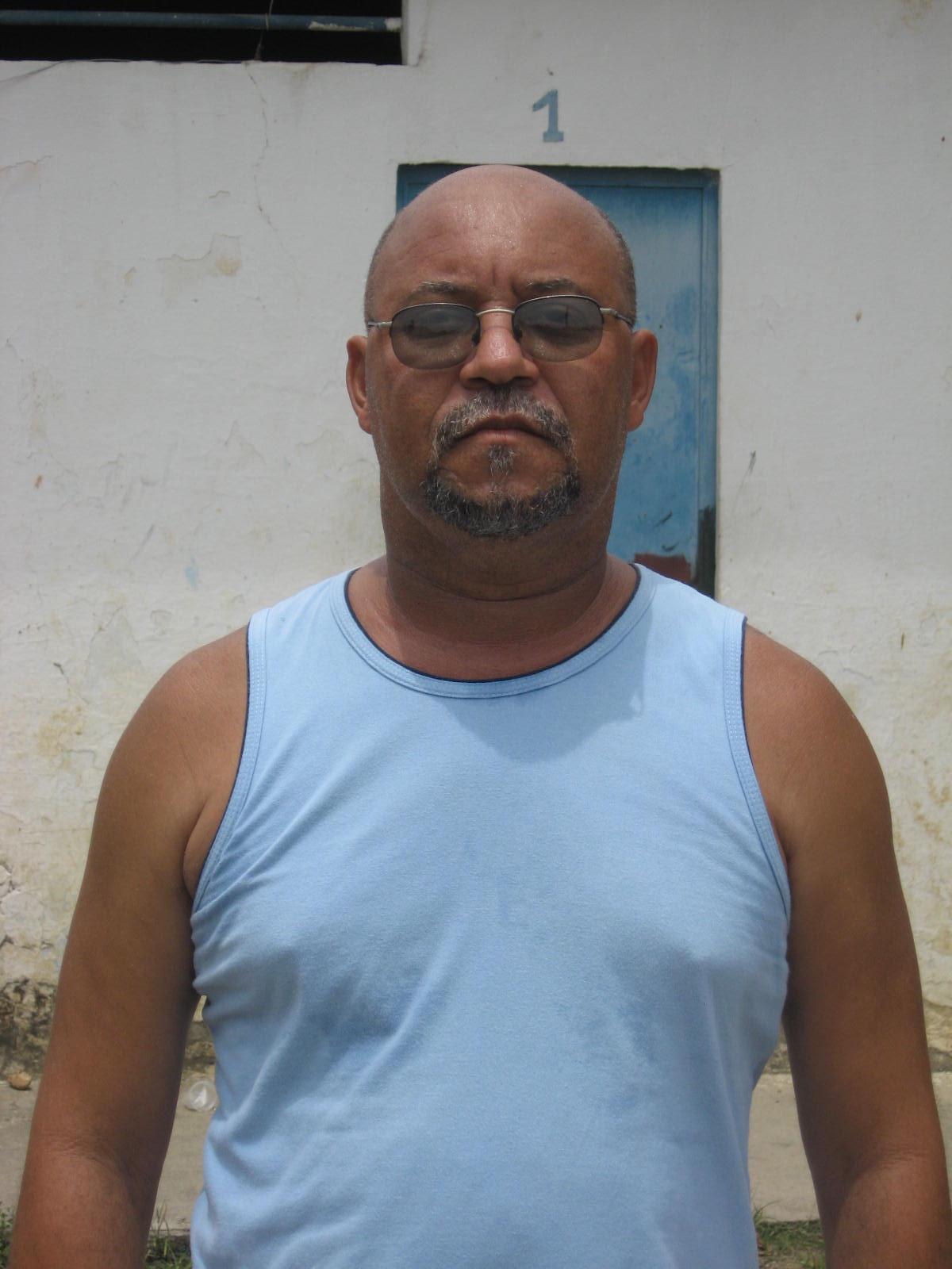 Jaílton Paschoal de Farias, presidente do Éden Futebol Clube.